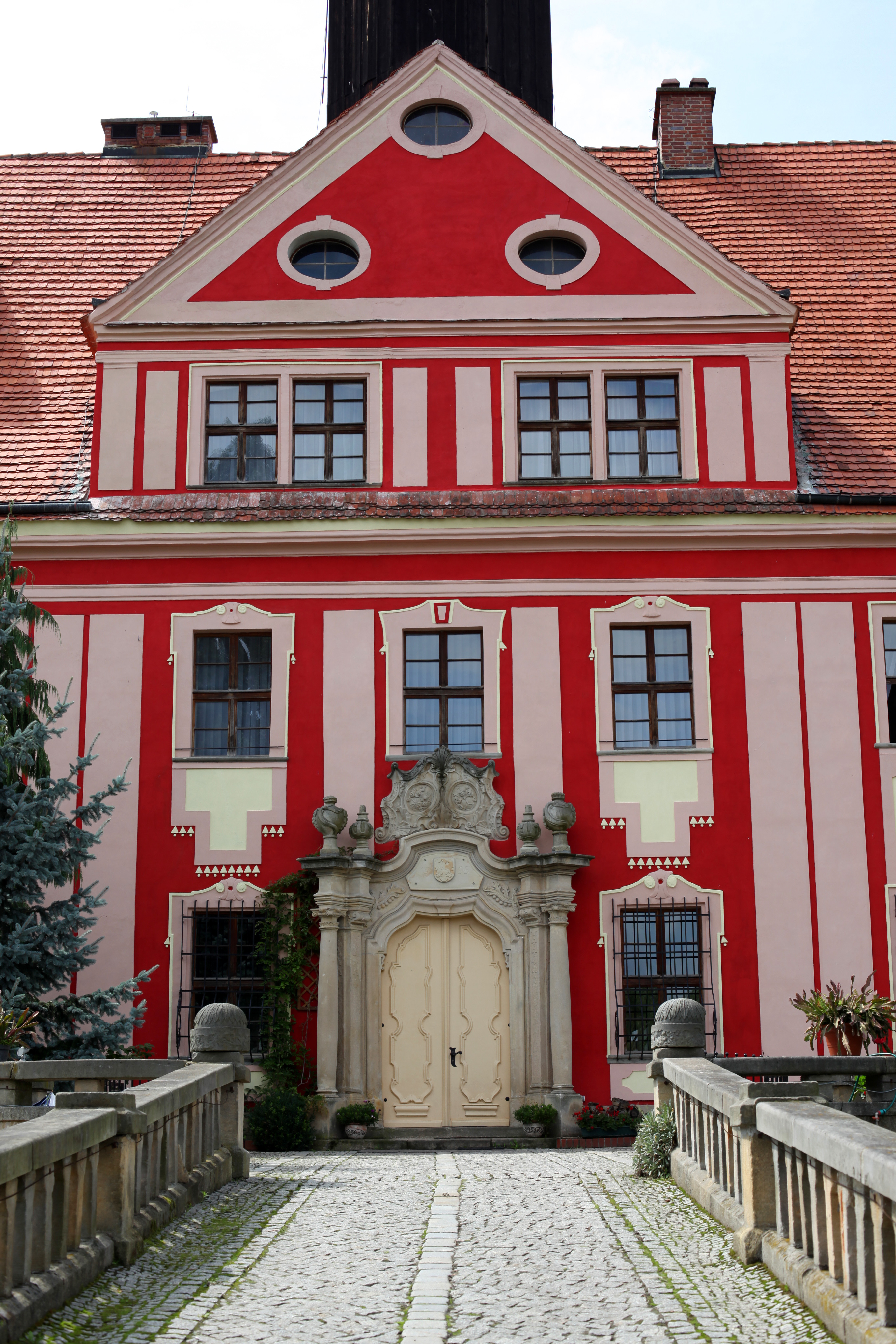 Warmątowice Sienkiewiczowskie, pałac, XVII, 1748